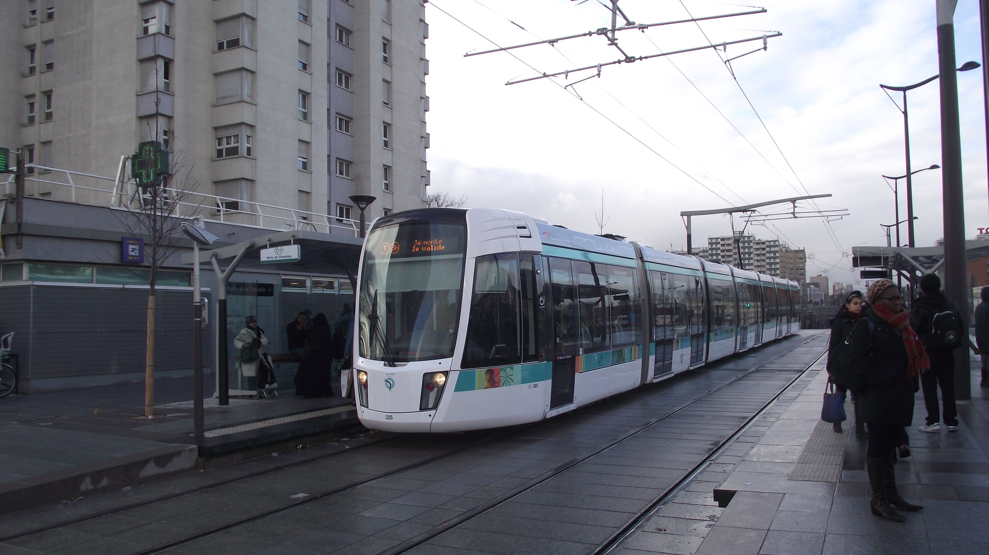 Voorlopige eindhalte van tramlijn T3b bij Porte de la Chapelle metrostation.